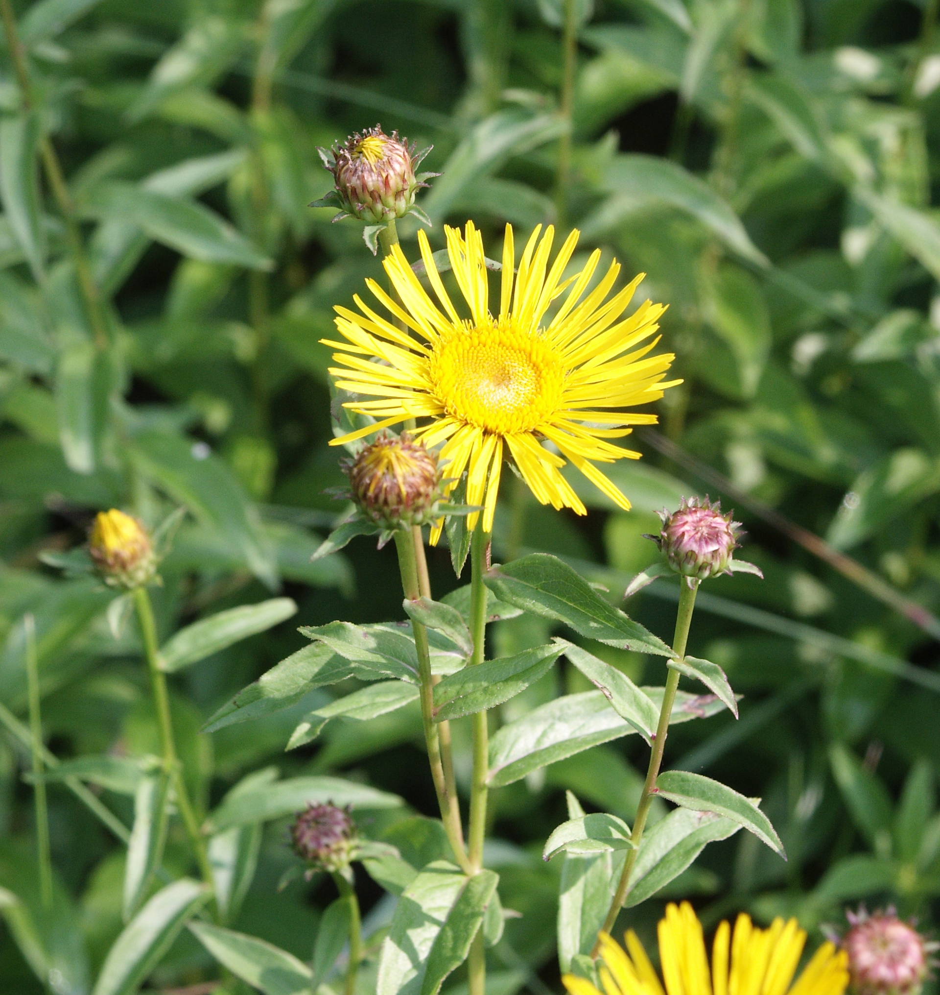 Inula salicina, Hohenlohe, Germany